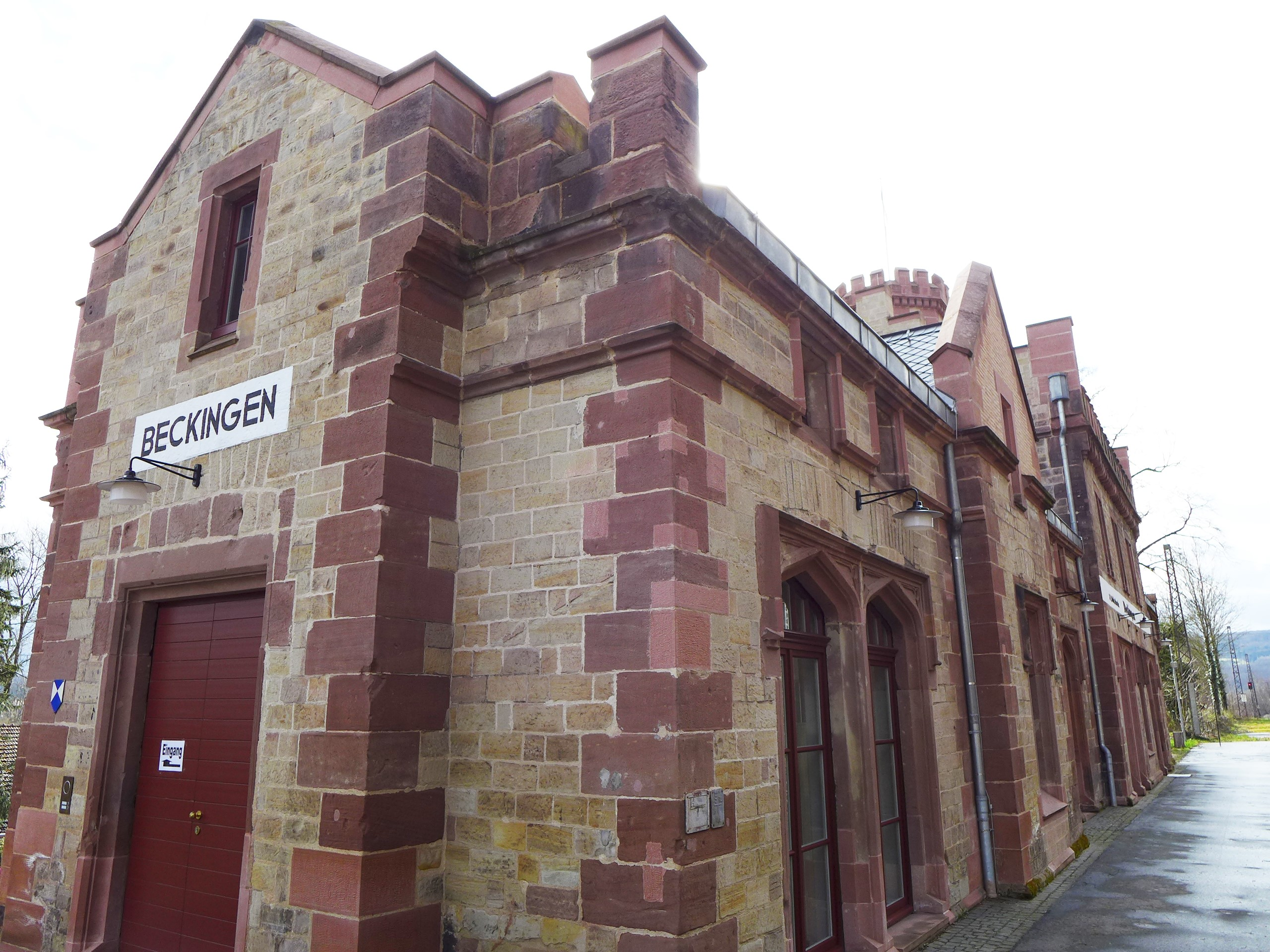 Bahnhof Beckingen (Saar), Partie am Bahnsteig